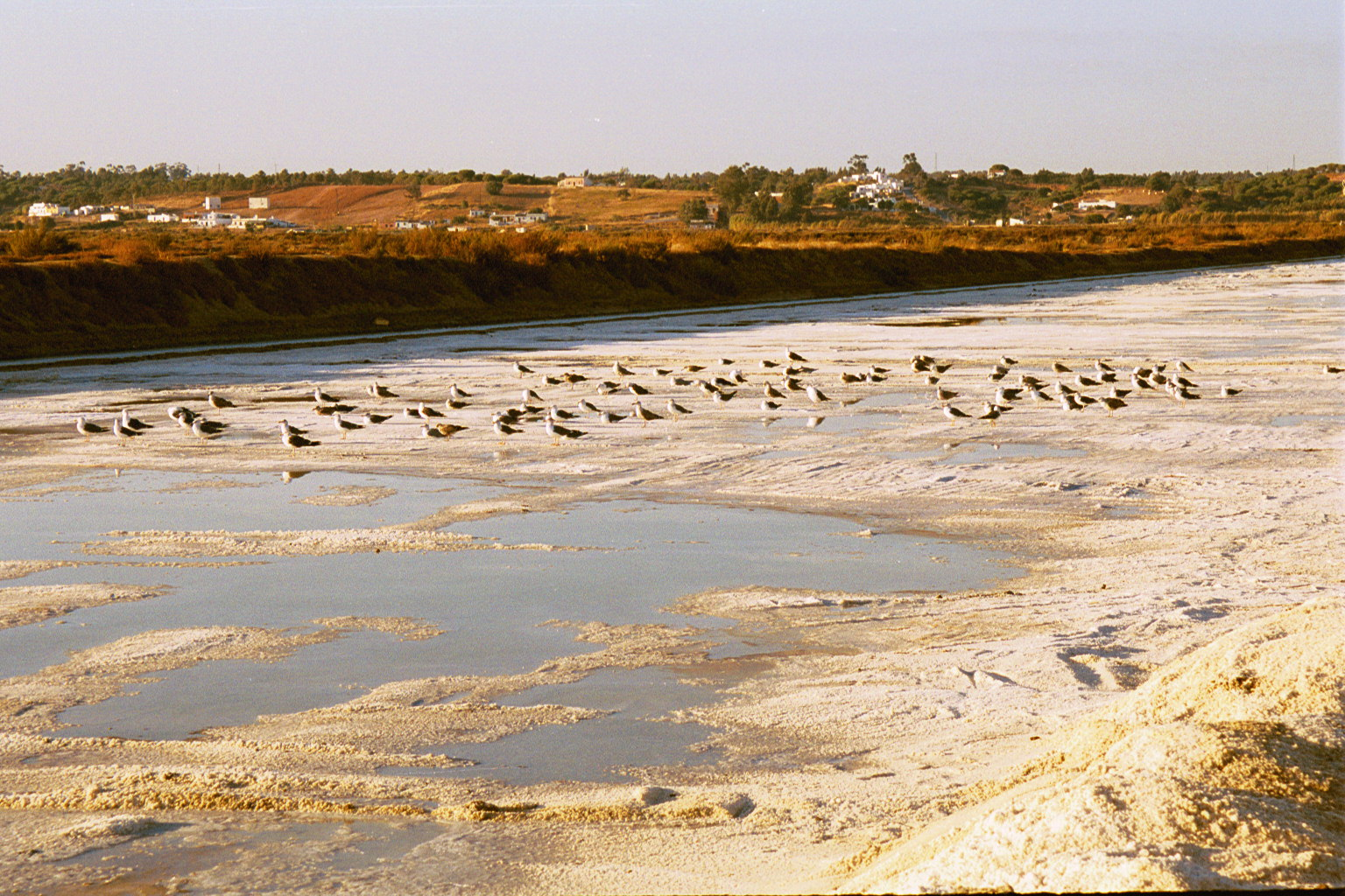 Gaviotas en las salinas de Isla Cristina